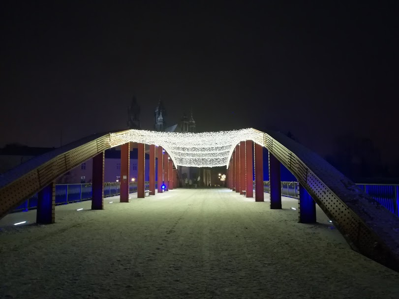 Мост Йордана